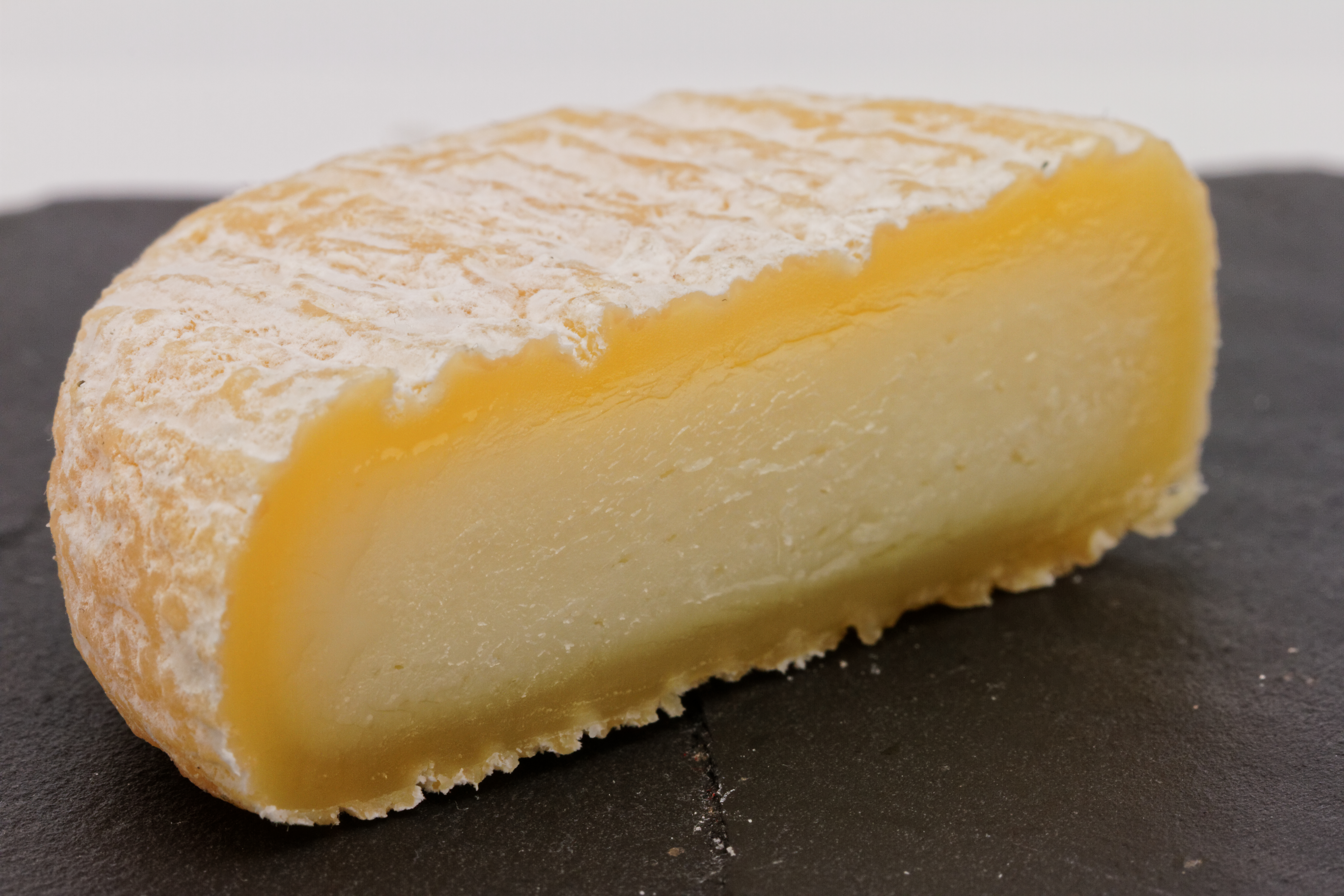 Le Picodon, fromage de la Drôme, l'Ardèche, le Vaucluse et le Gard.